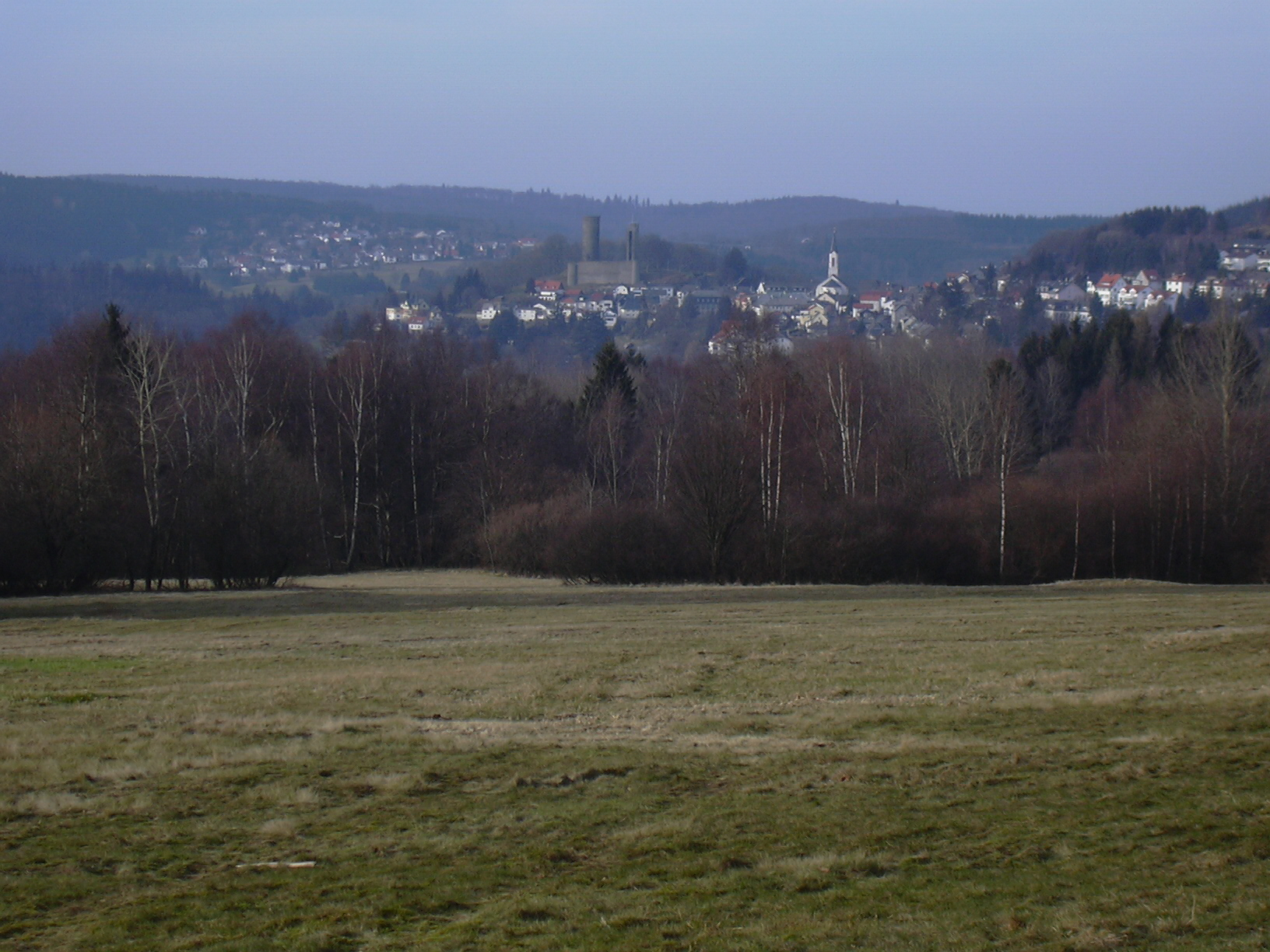 Reifenberg Meadows Nature Reserve, Taunus/Germany